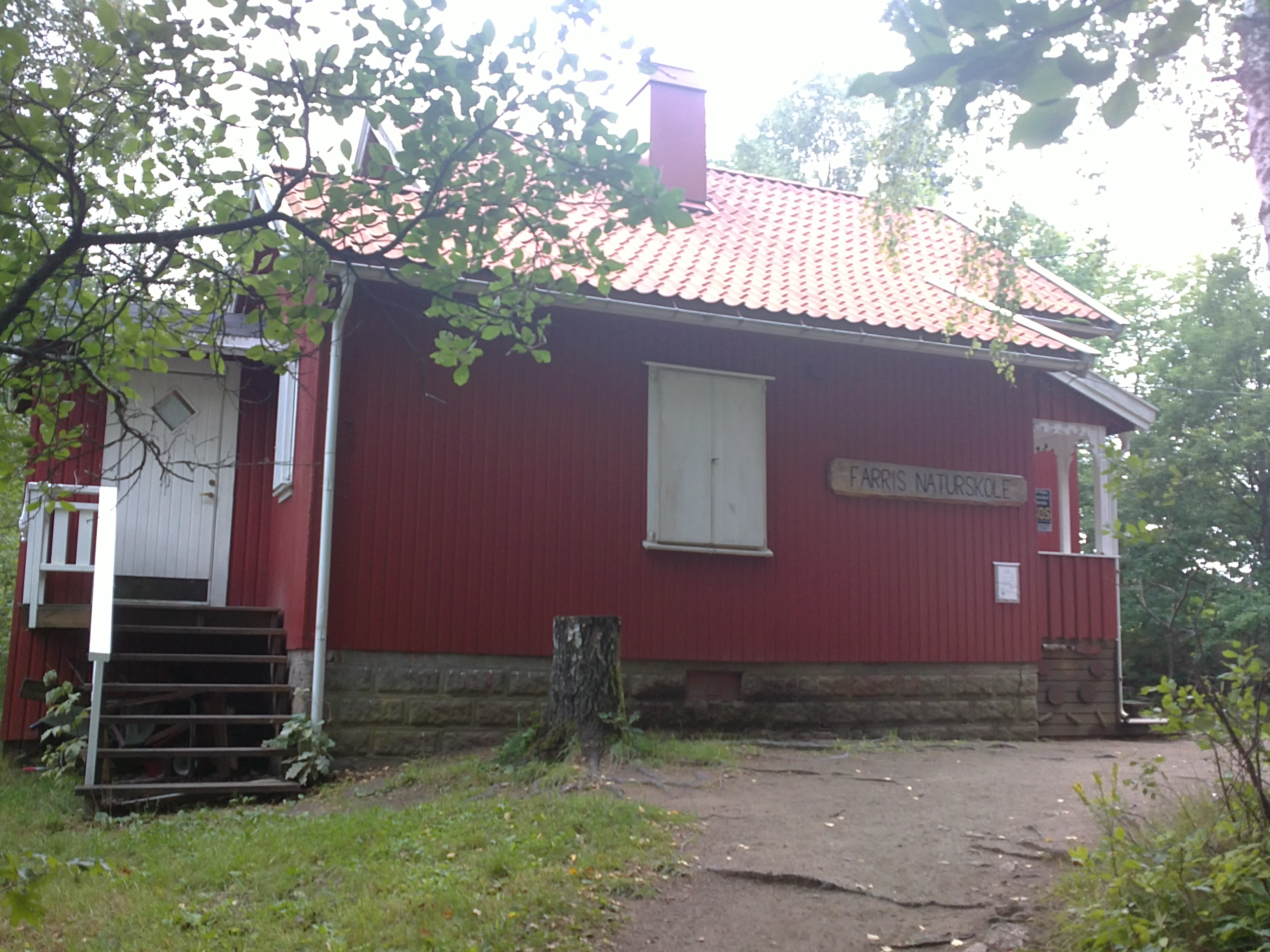 Bilde av Farris Naturskole